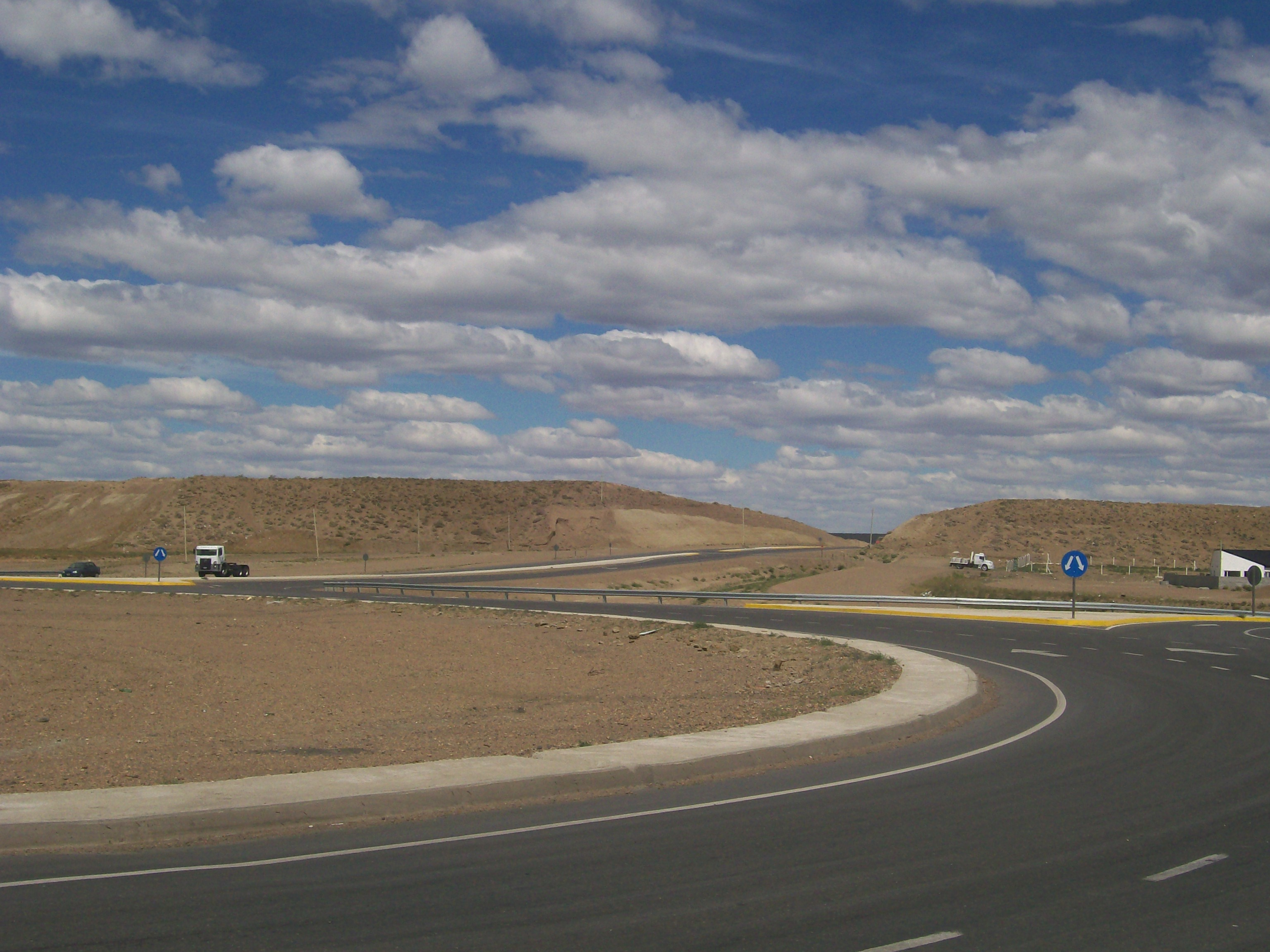 vista a la circunvalacion